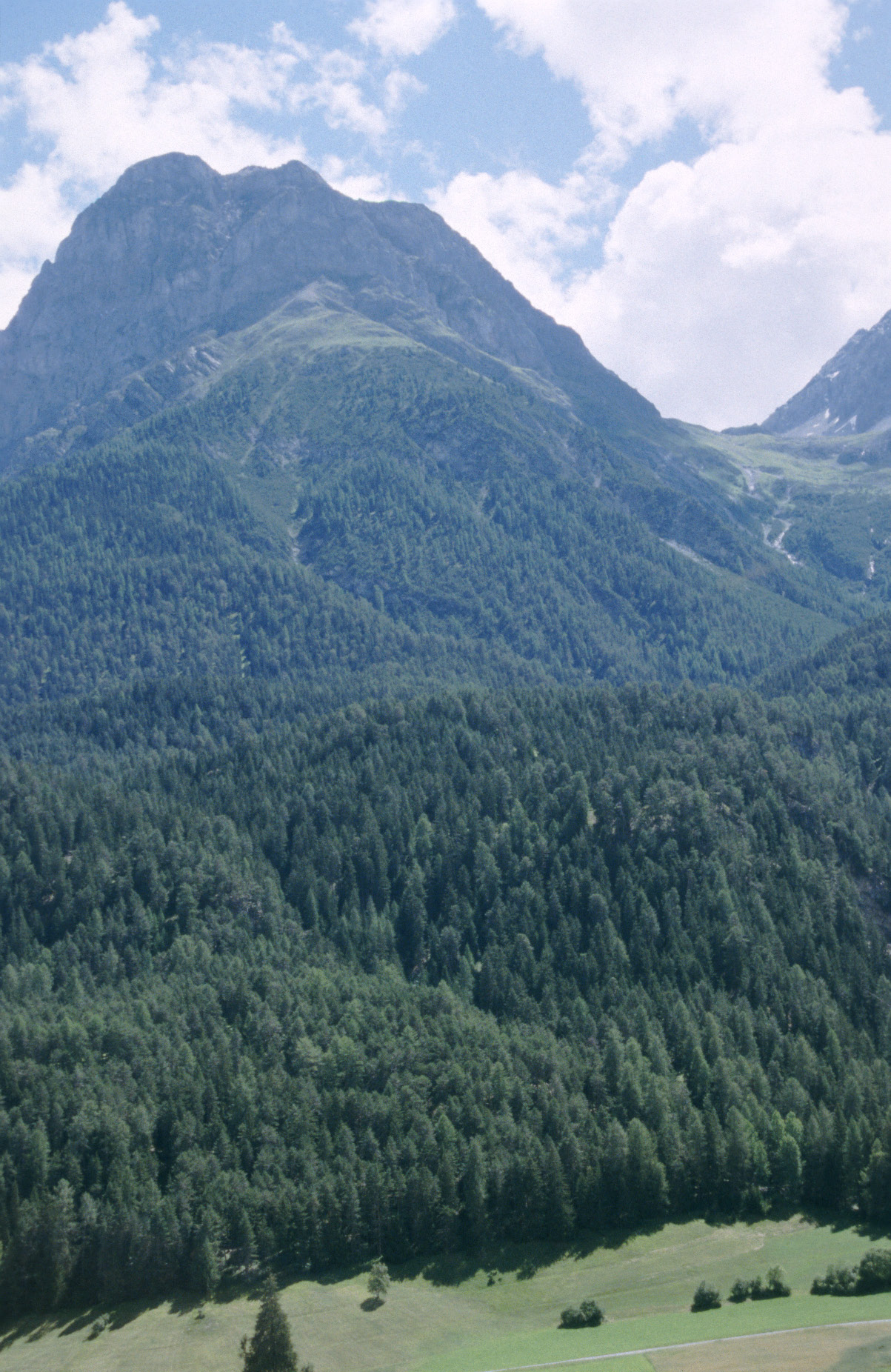 Piz Lischana von Nordenwesten